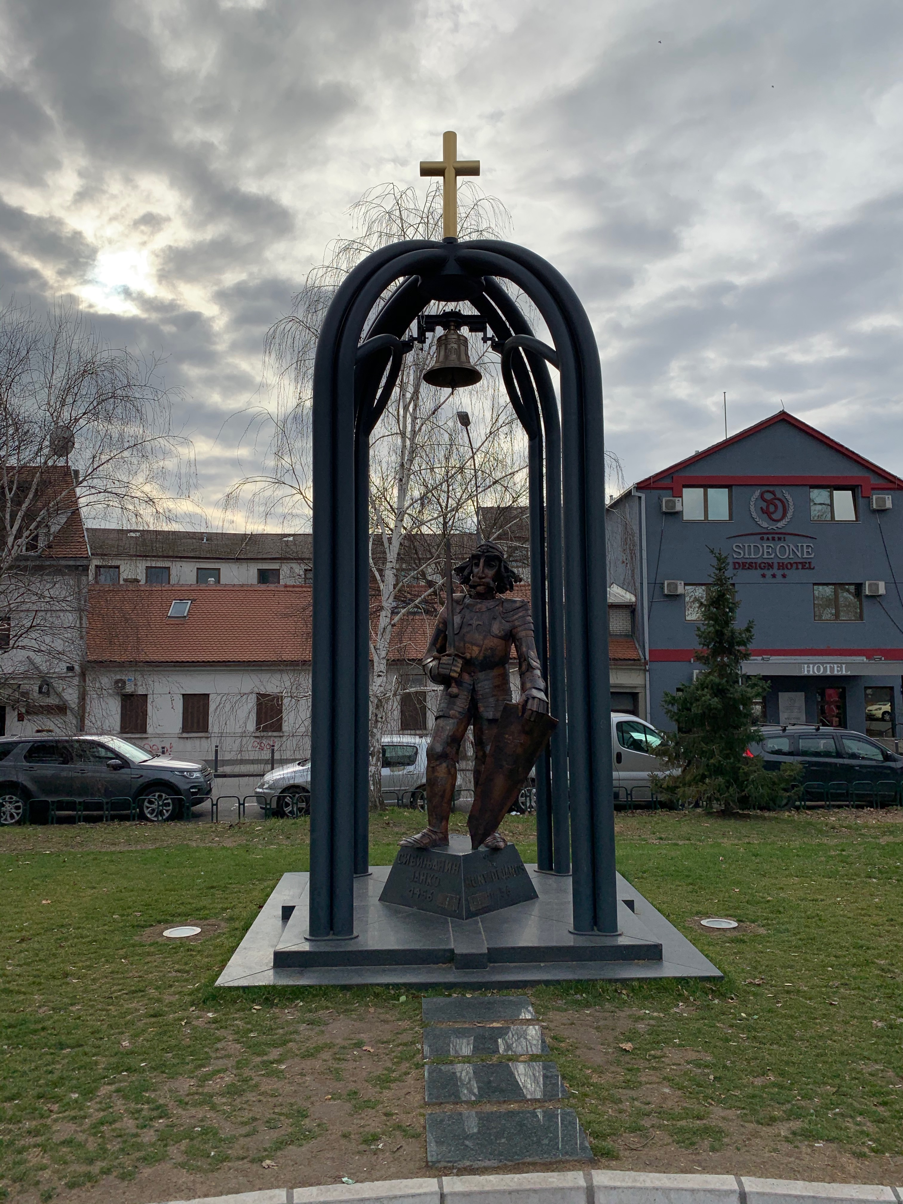 Srpski (latinica): Spomenik Sibinjanin Janku